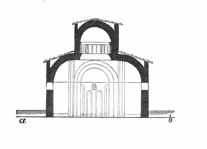 Bilder aus dem in derselben Kategorie befindlichen Artikel aus den Mittheilungen der kaiserl. königl. Central-Commission zur Erforschung und Erhaltung der Baudenkmale Band 1, 1856.